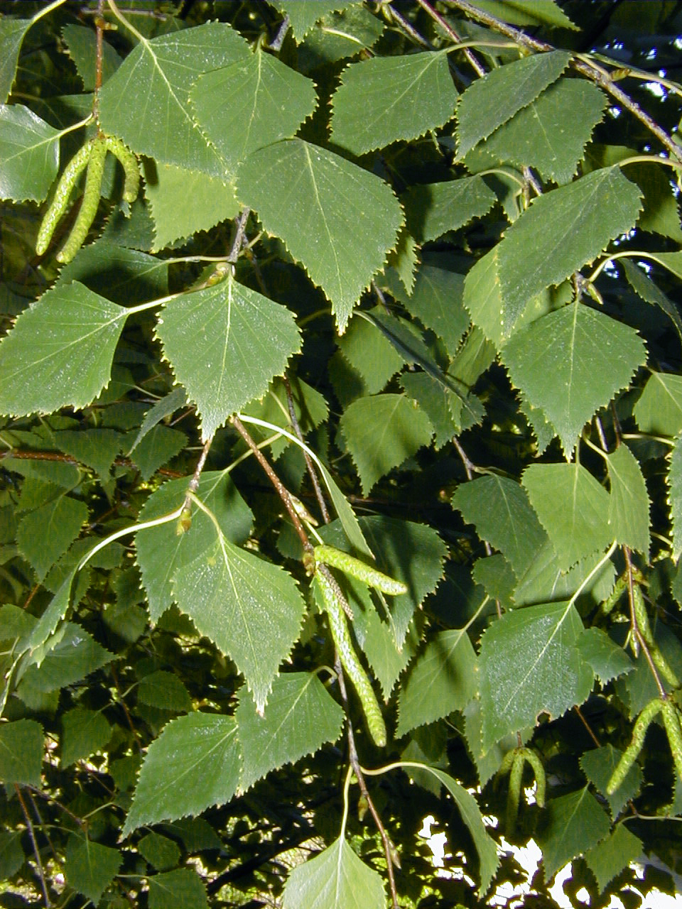 Betula pendula subsp. fontqueri. Real Jardín Botánico, Madrid